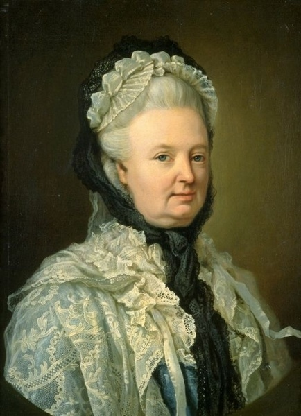 Elisabeth Christine von Braunschweig-Bevern, Prussian queen, as an old woman